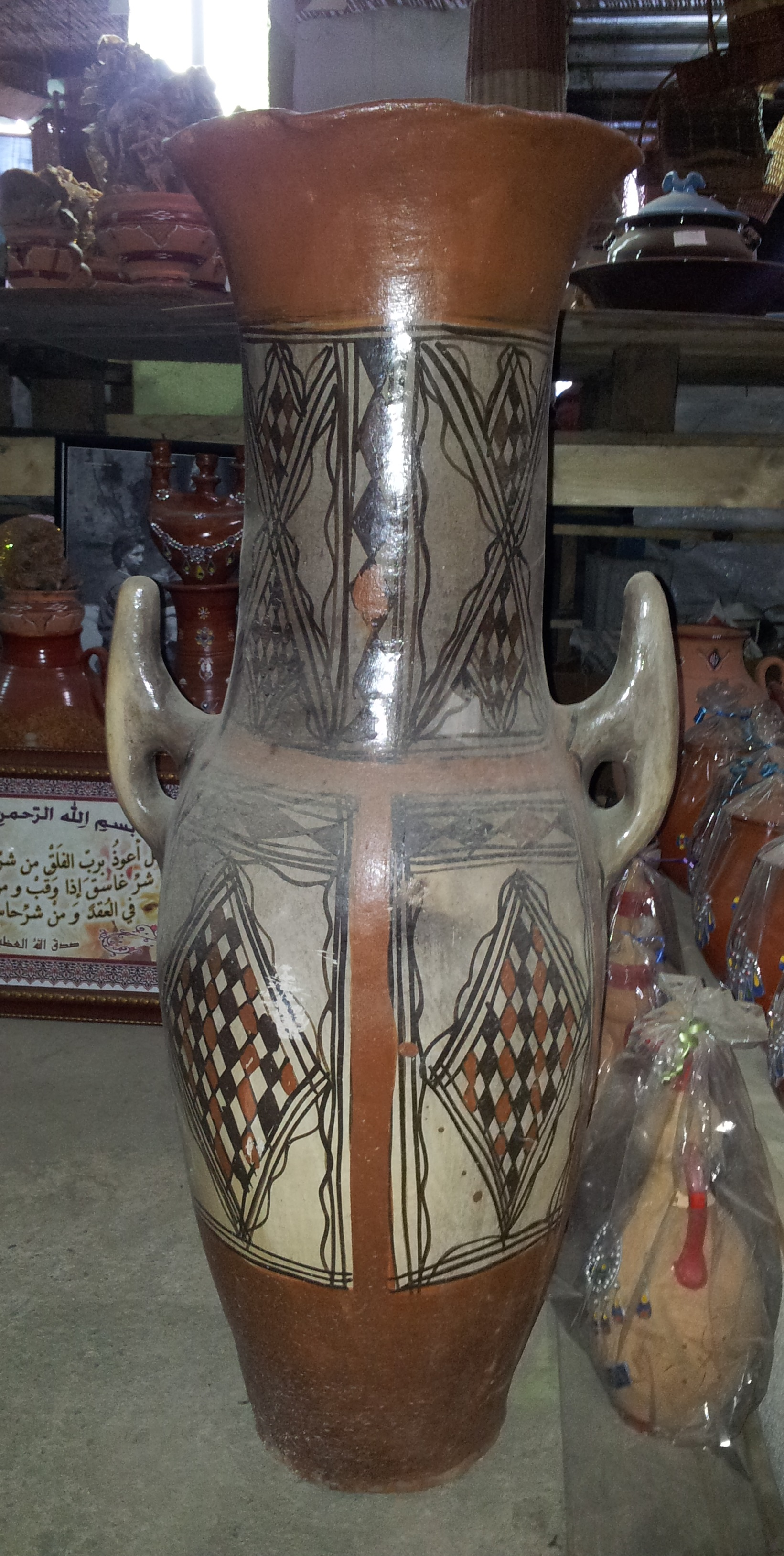 Cruche en poterie (Artisanat kabyle)